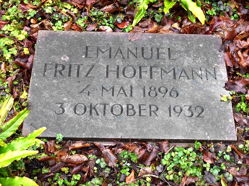 Emanuel Fritz Hoffmann-Stehlin (1896–1932) Vizedirektor F. Hoffmann-La Roche & Co. in Basel, Kunstsammler, u.a. von Marc Chagall, James Ensor, Mirò, Max Ernst, Paul Klee, Pablo Picasso, Familiengrab auf dem Friedhof Hörnli, Riehen, Basel-Stadt